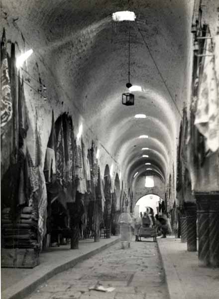 Souk dans la Médina de Tunis, Tunisie